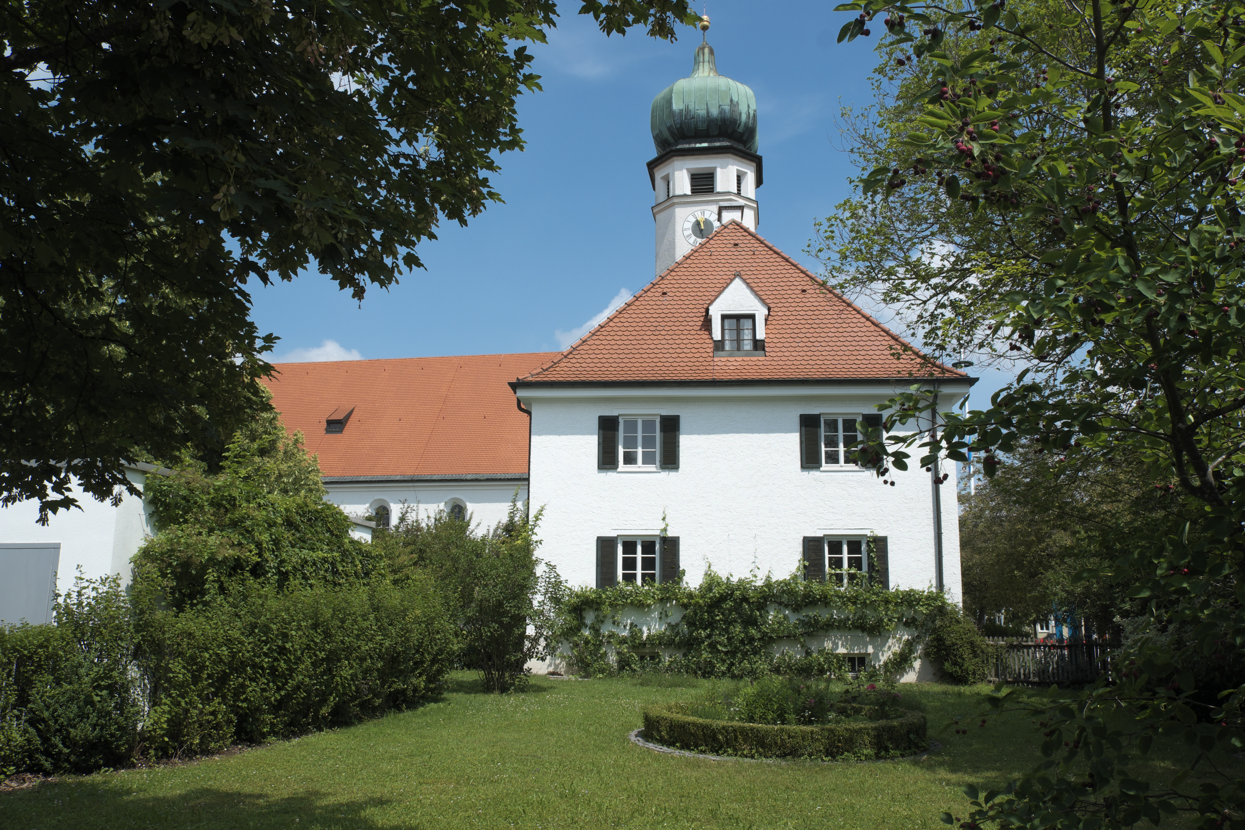 Pfarrhaus in Eichenau im Landkreis Fürstenfeldbruck (Bayern/Deutschland), im Hintergrund Turm der katholischen Pfarrkirche Zu den Heiligen Schutzengeln